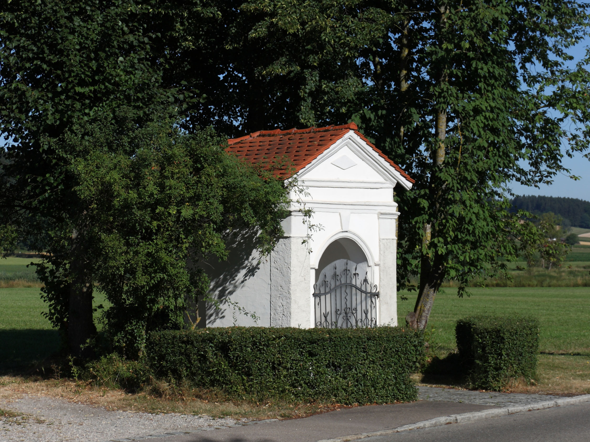 Feldkapelle am nördl. Ortsrand von Loppenhausen, 2. Hälfte 19. Jh.